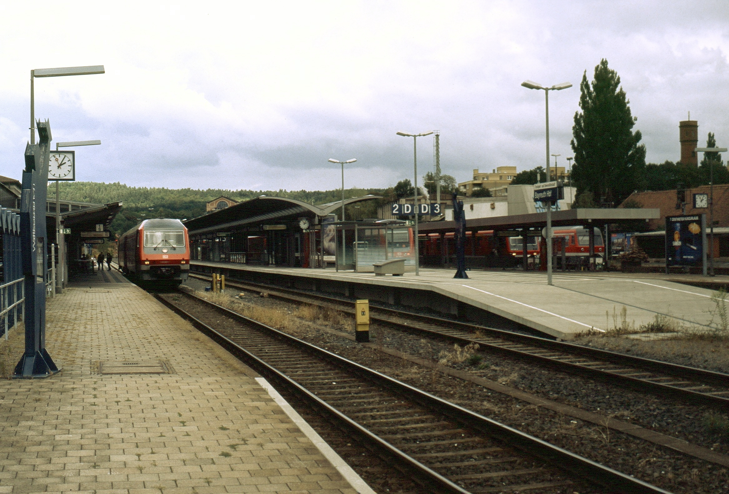 Hauptbahnhof Bayreuth